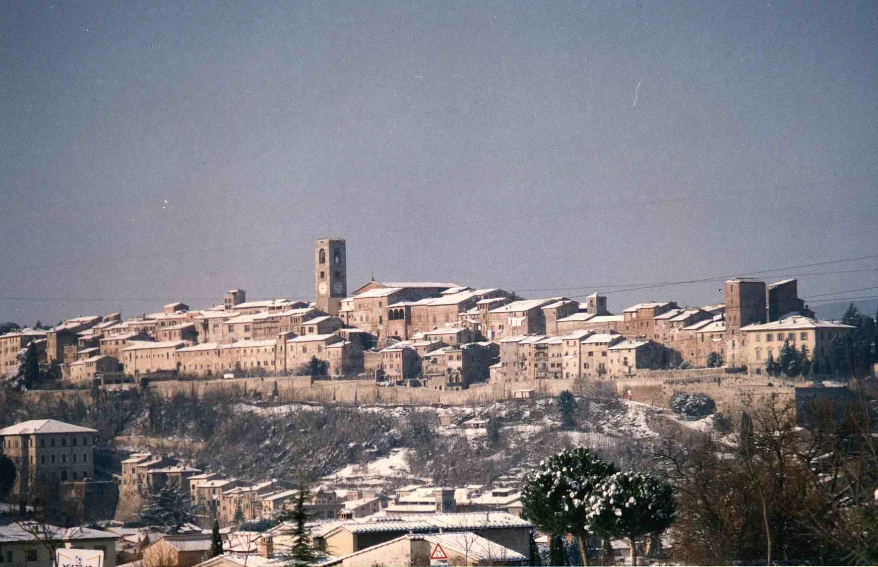 Colle di Val d'Elsa (Siena-Italia): Panorama del centro storico sotto la neve